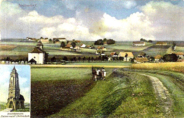 Nollendorf, Tschechische Republik